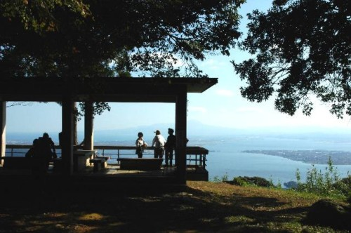 Kezouji Temple on Mount Makuragi in Matsue City - 松江市の華蔵寺（けぞうじ）